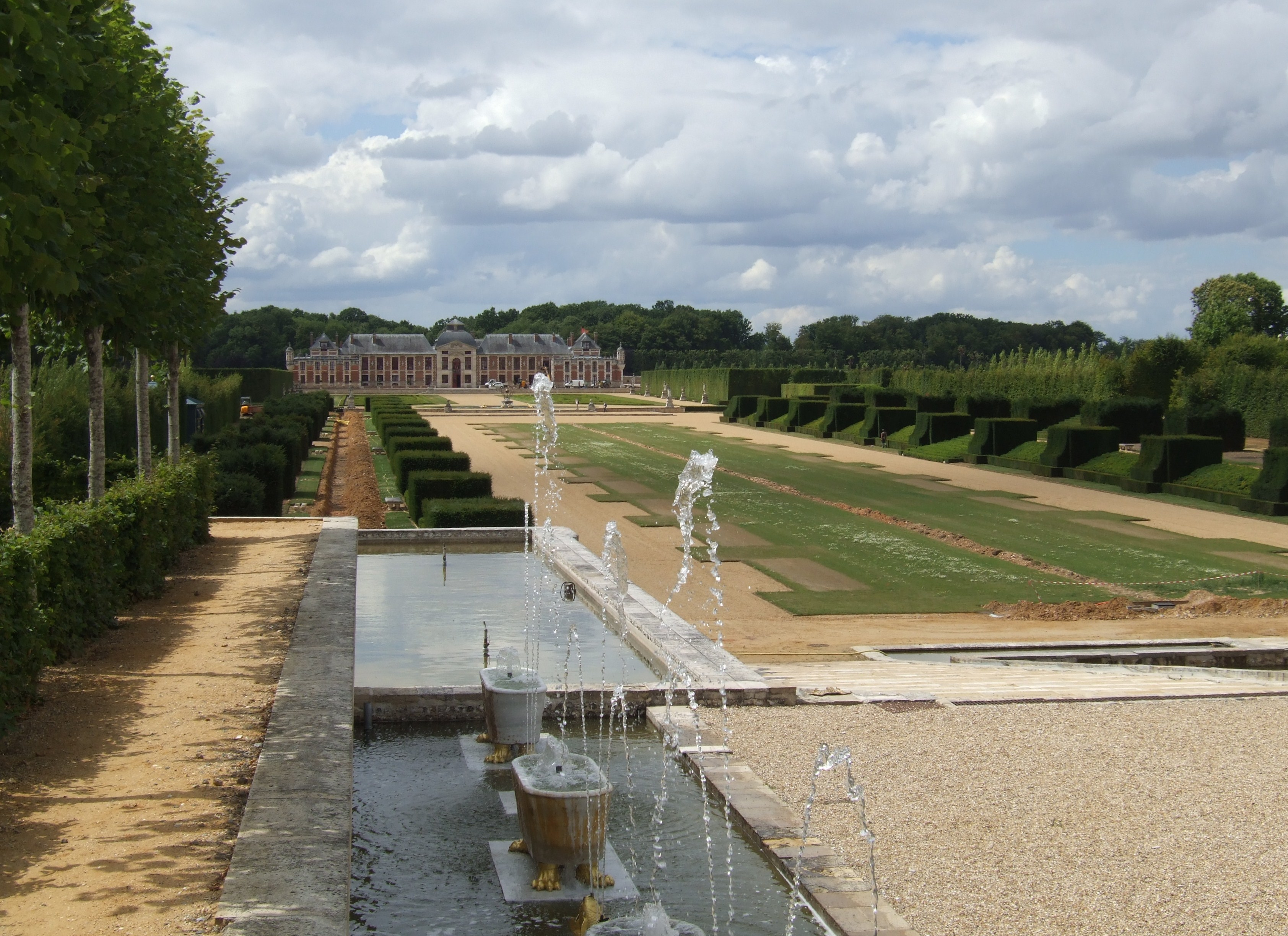 Château du Champ-de-Bataille vu du parc (Eure, Normandie, France)